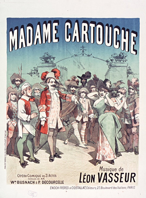 Madame Cartouche, musique de Léon Vasseur, opéra-comique en 3 actes, paroles de MM. Wm Busnach & P. Decourcelle, Enoch Frères et Costallat [éditeurs], lithographic poster printed [designed ?] by Emile Lévy (Paris).